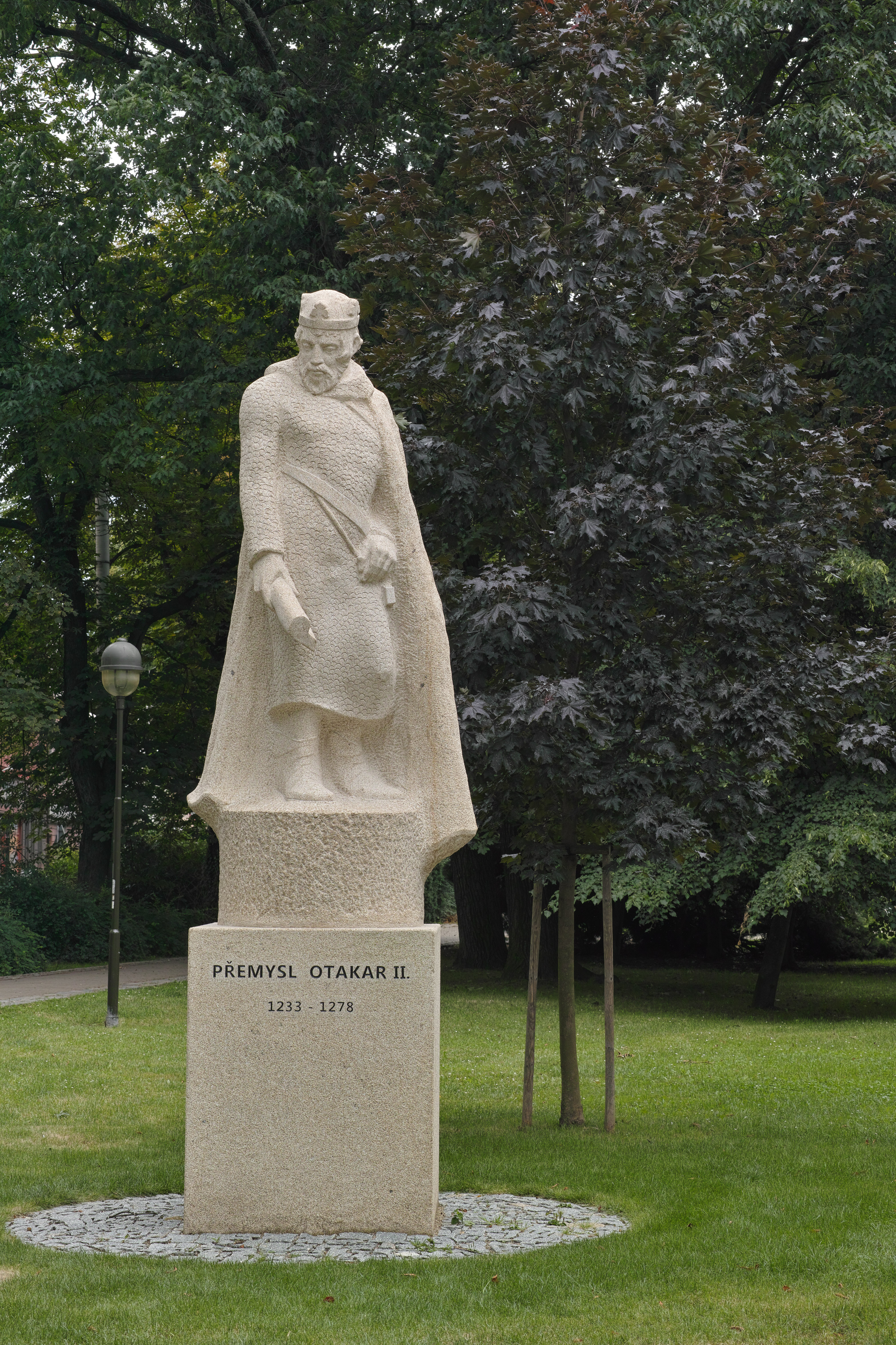 socha Přemysla Otakara II., Č. Budějovice